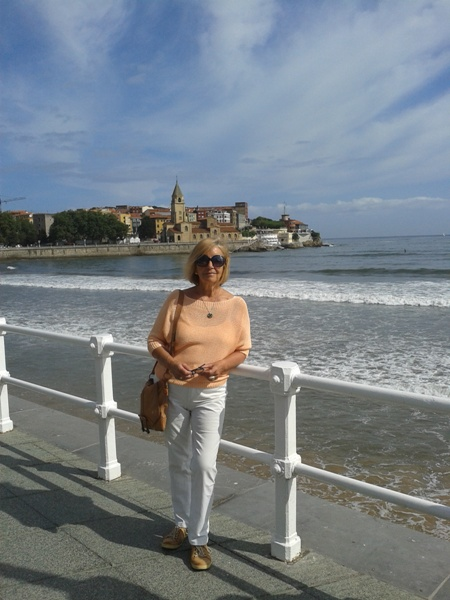 Maria Luisa Prada Sarasúa en Gijón, ciudad en la que reside.